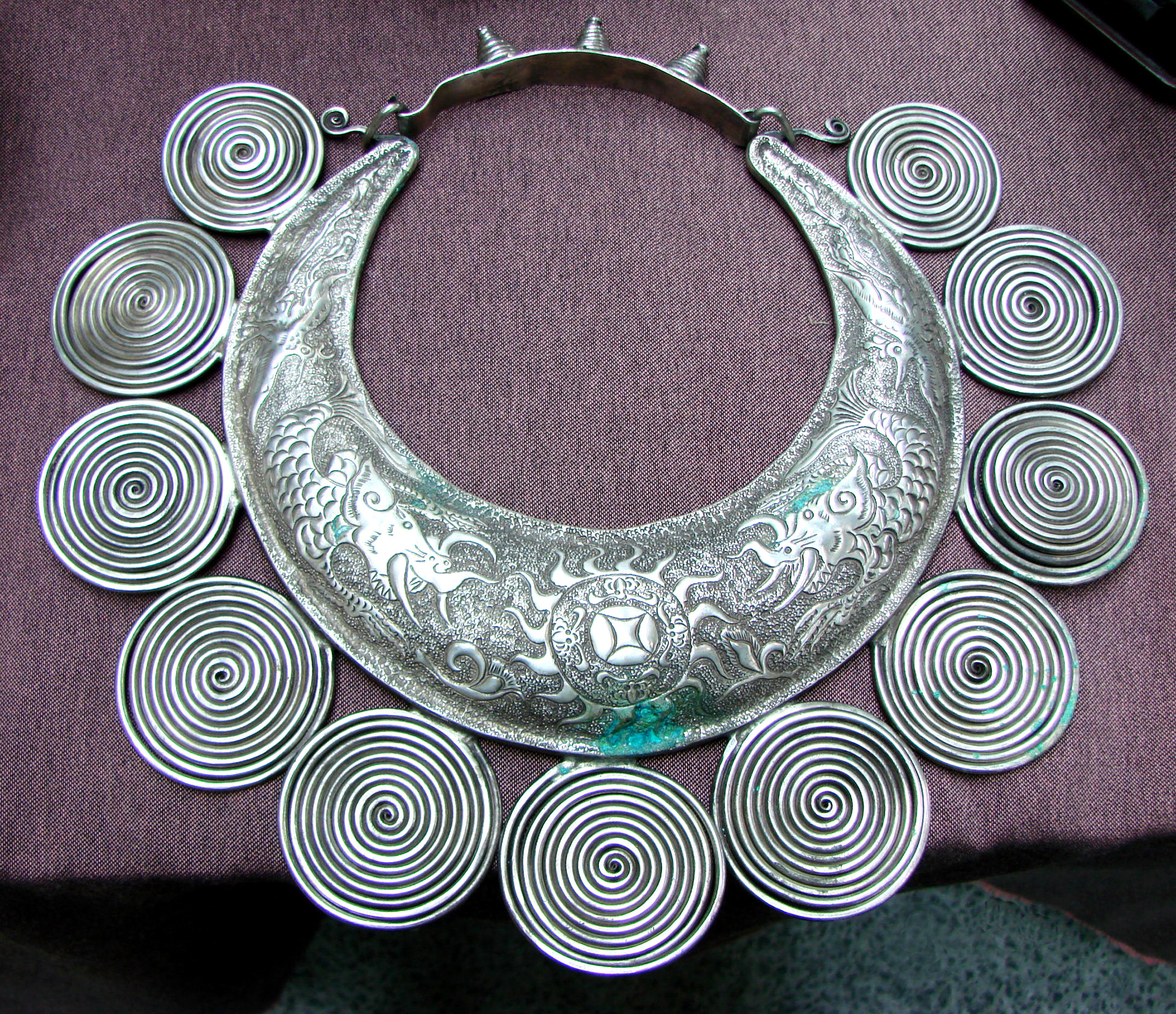 Bijou de l'ethnie Miao (Hmong).